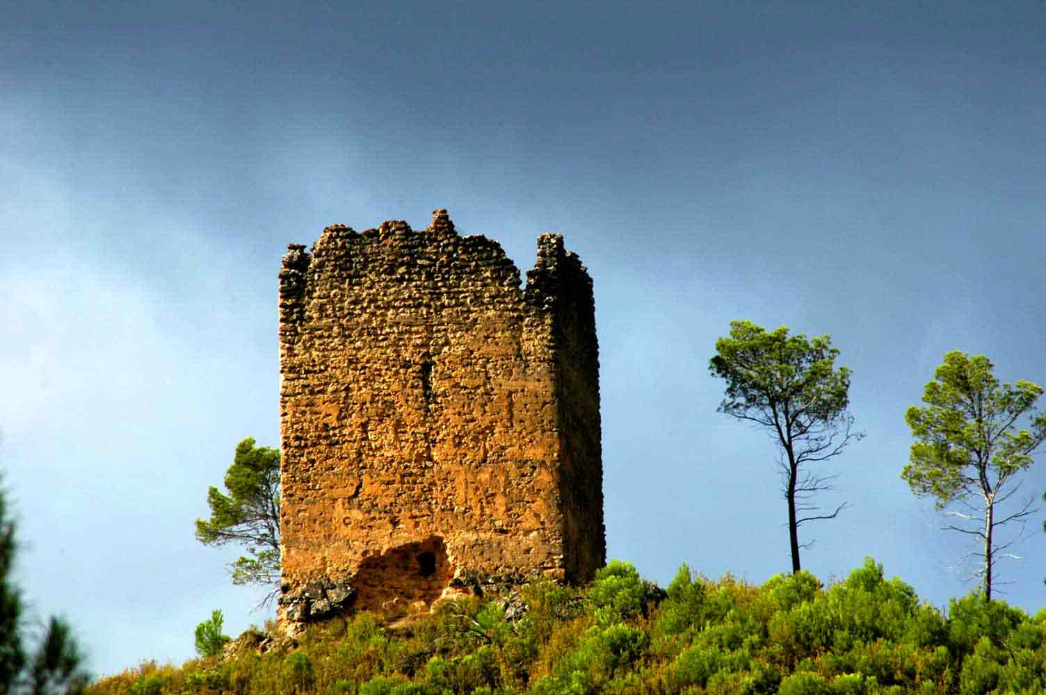 Vista de la atalaya de Moropeche (Yeste, provincia de Albacete, Castilla-La Mancha).